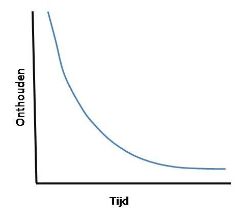 Vergeetcurve